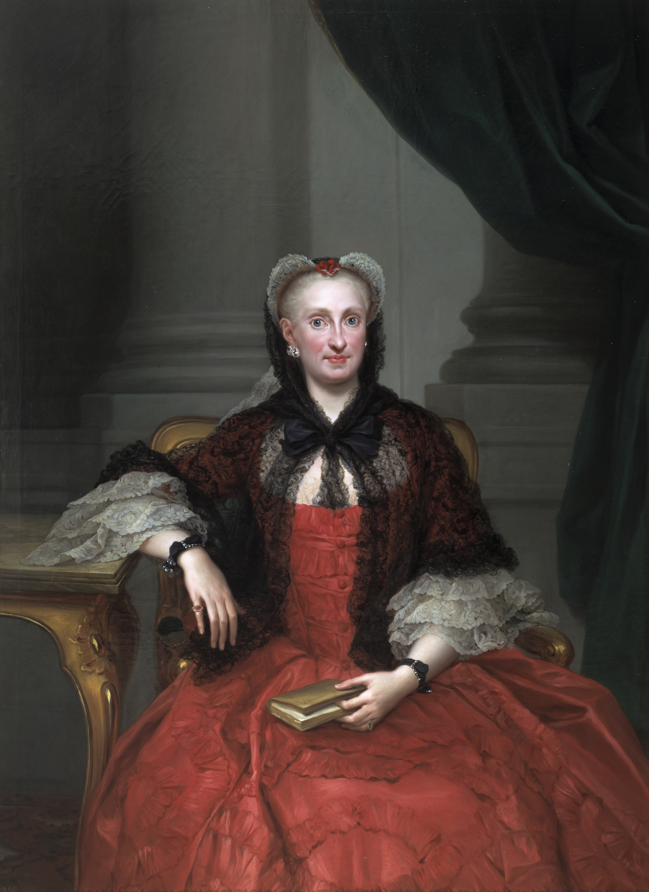 Retrato póstumo de la reina María Amalia de Sajonia (1724-1760), que fue reina consorte de Nápoles y de Sicilia y posteriormente de España por su matrimonio con el rey Carlos III de España.